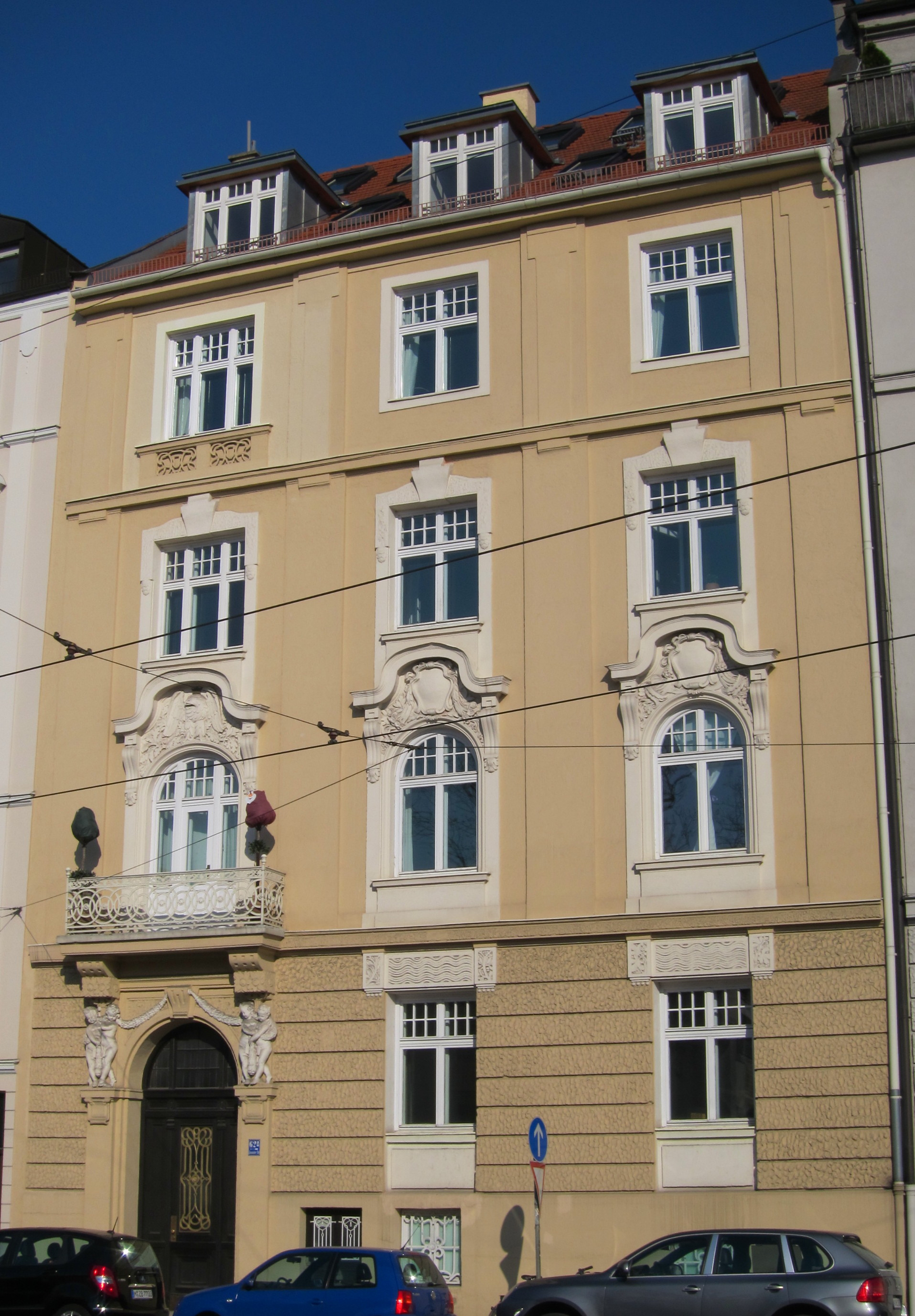 Ismaninger Straße 62 a; Mietshaus, neubarock, mit Figurenportal und Stuckdekor, um 1900; Gruppe mit Geibelstraße 1.